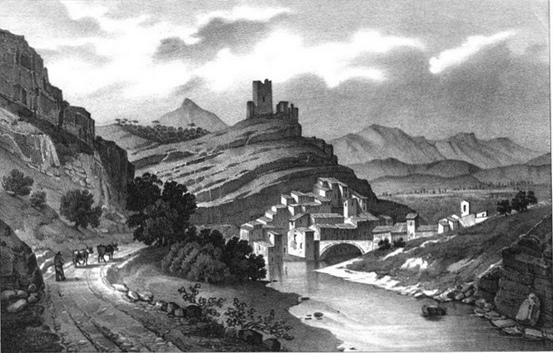 Pontaix